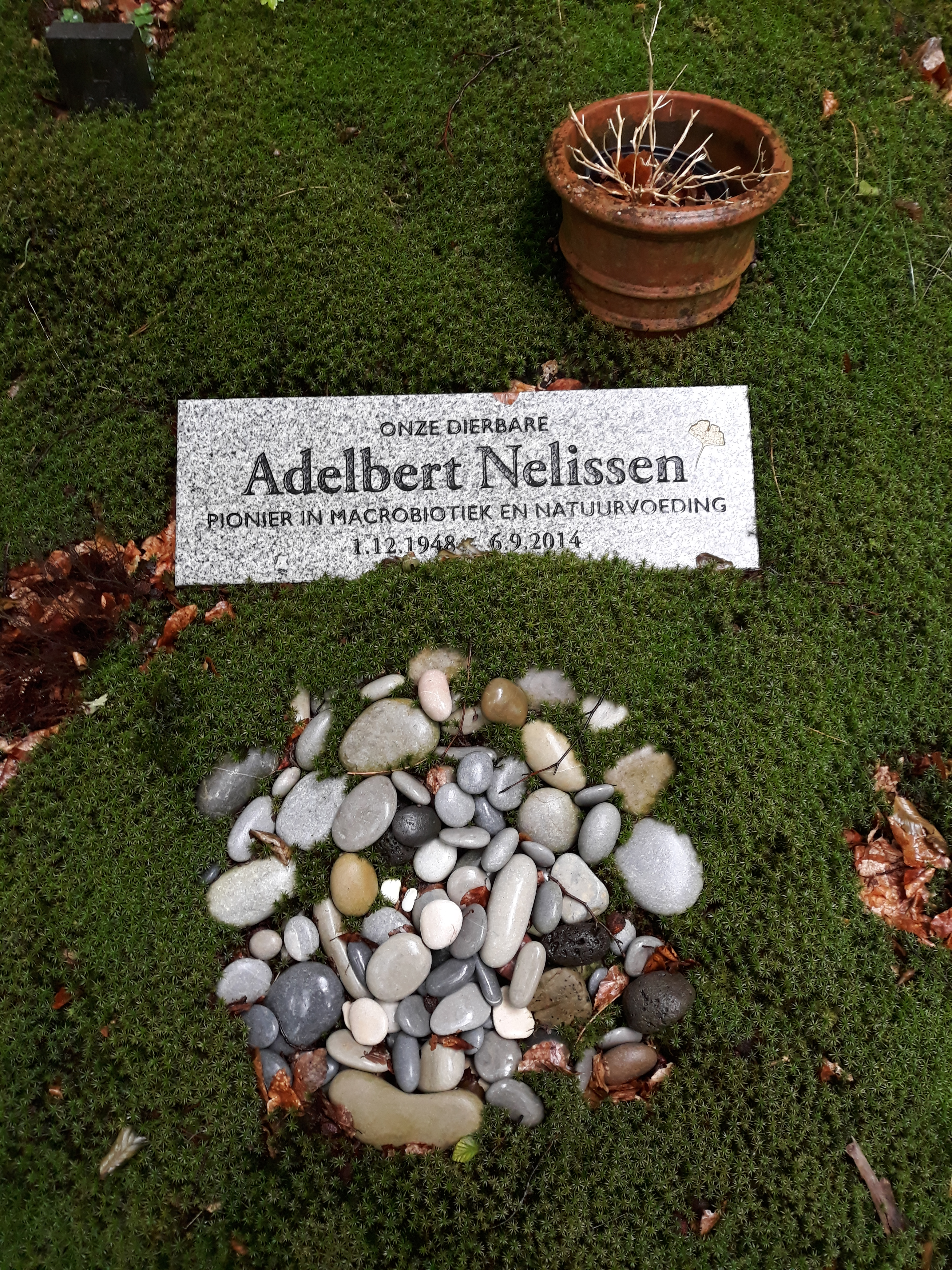 Das Grab des niederländischen Unternehmers (Naturkost) und Naturheilpraktikers Adelbert Nelissen auf dem Friedhof Bergweg in Bloemendaal.